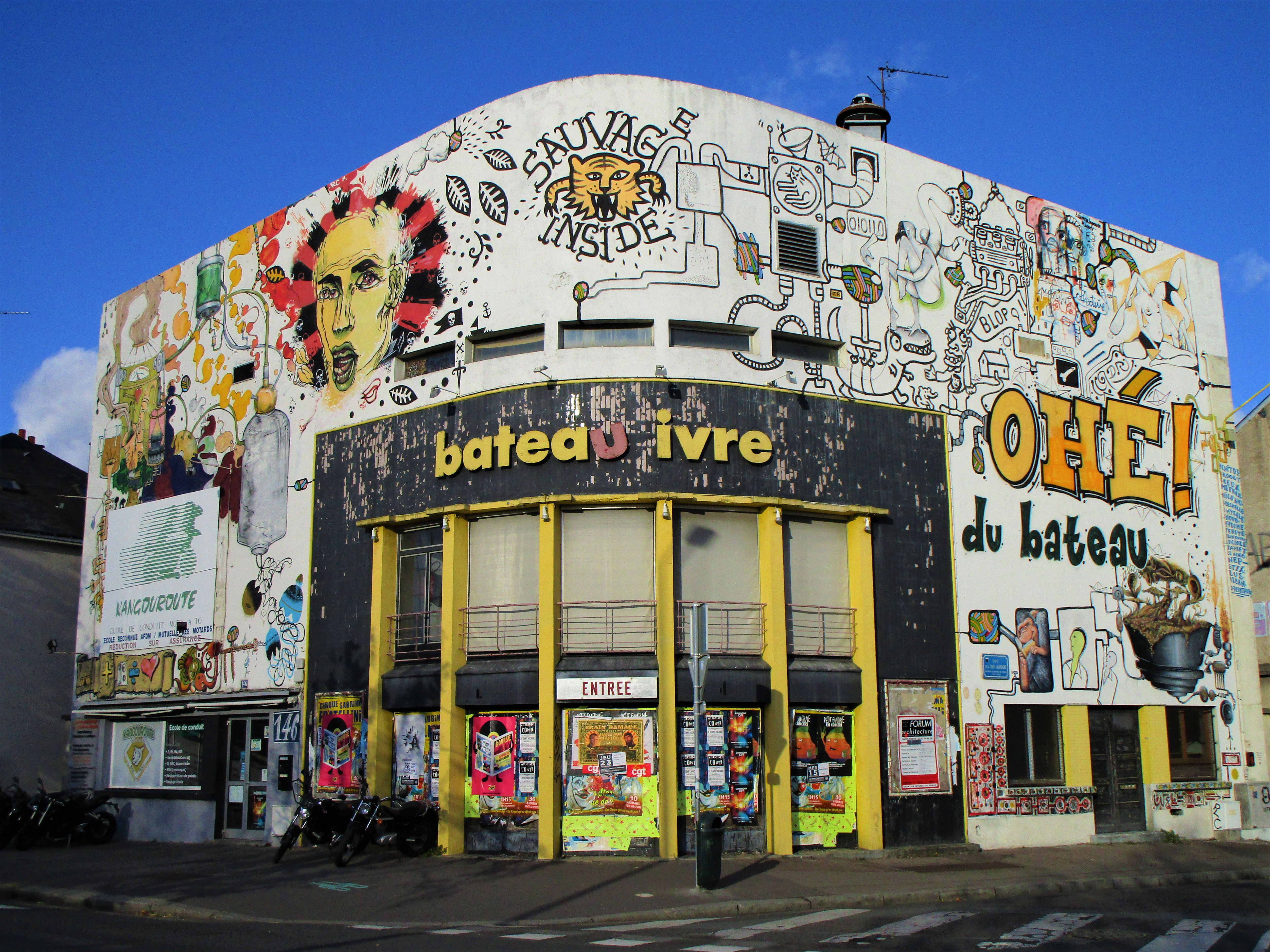 Vue du "Bateau ivre", salle de concert à Tours, avec ses peintures réalisée par le collectif "Ohé du bateau"